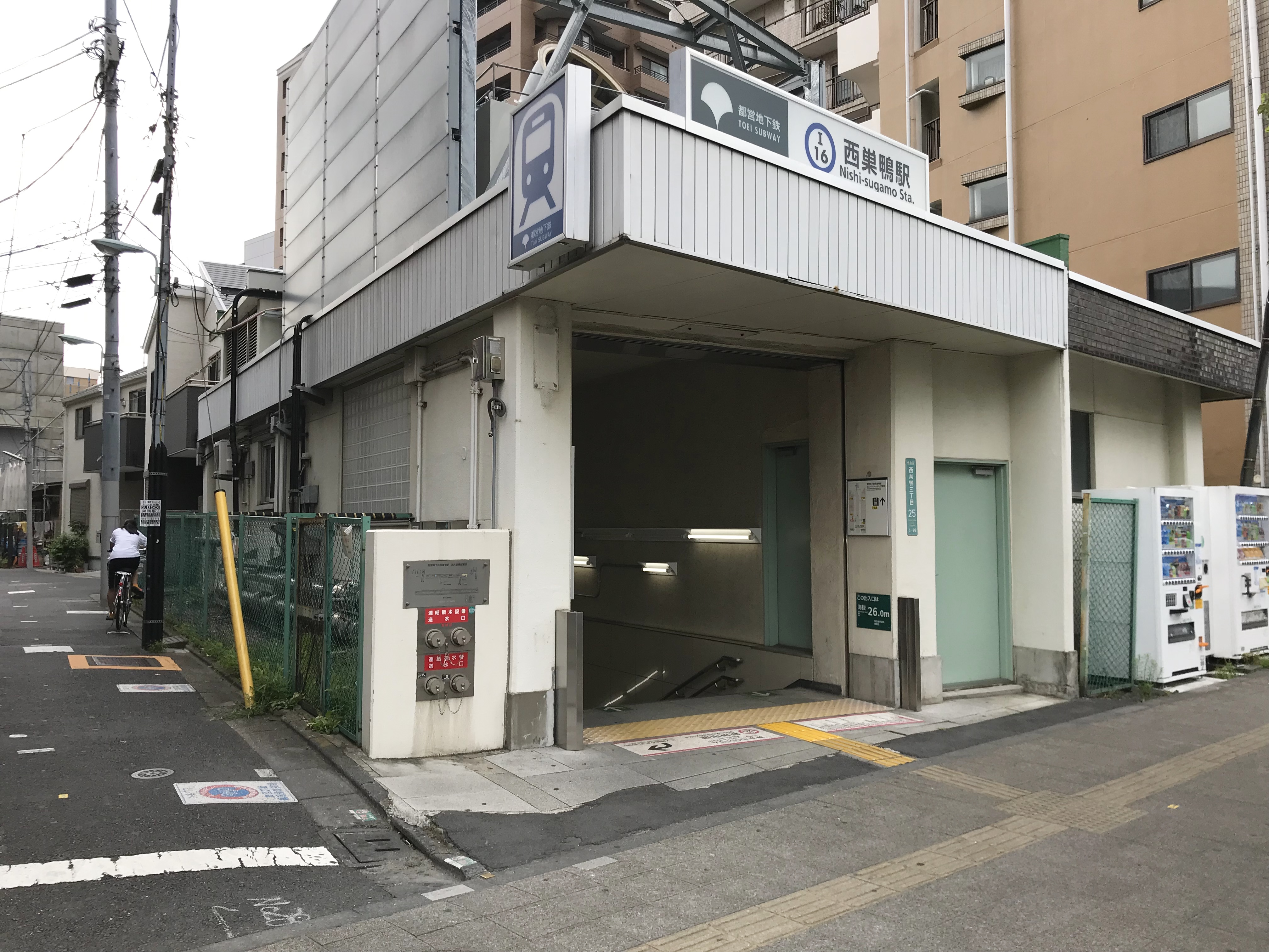 都営地下鉄三田線西巣鴨駅A1番出入口